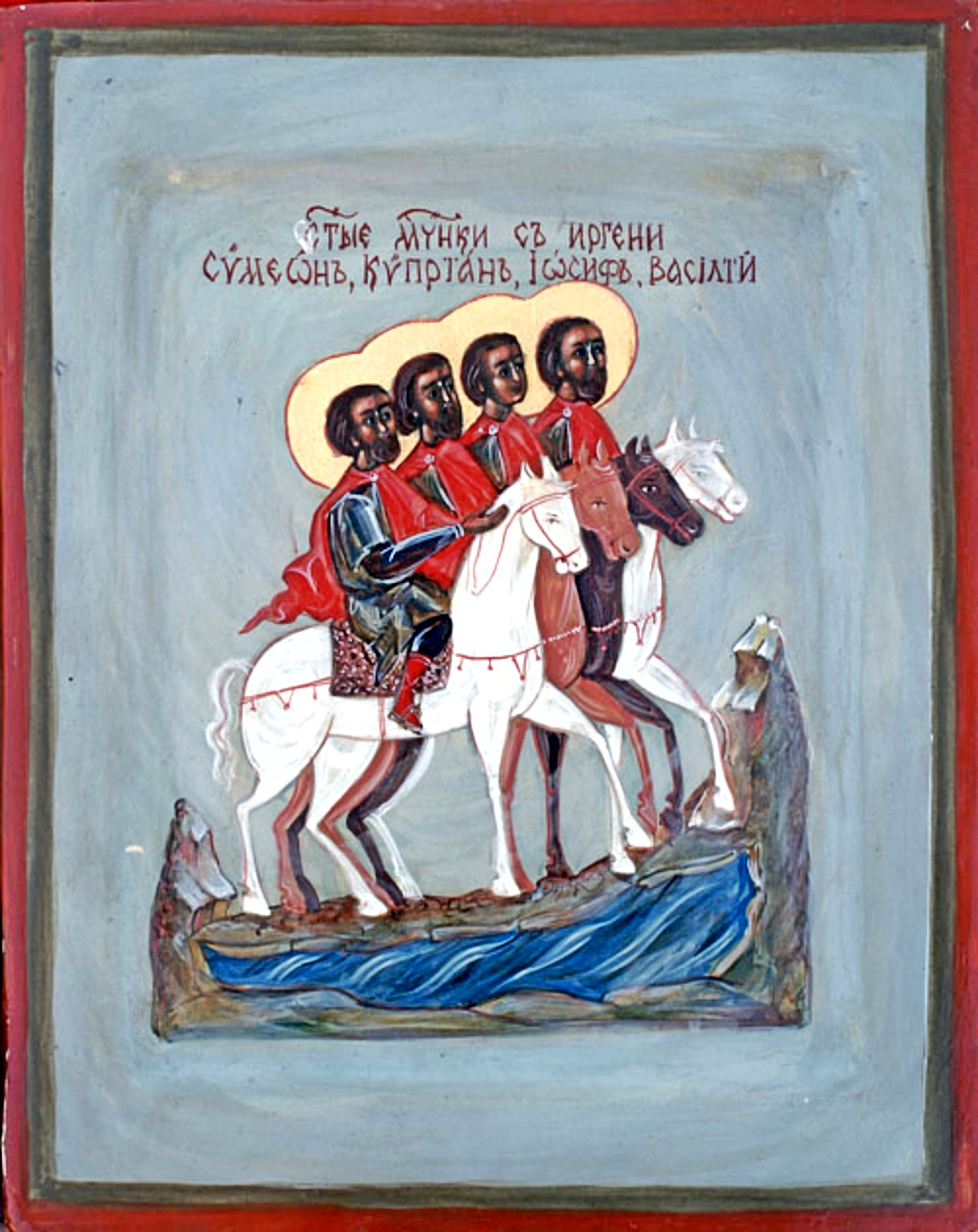 Икона с изображением "Иргенских мученников" - казаков Иргенского острога Симеона, Киприана, Иосифа и Василия.